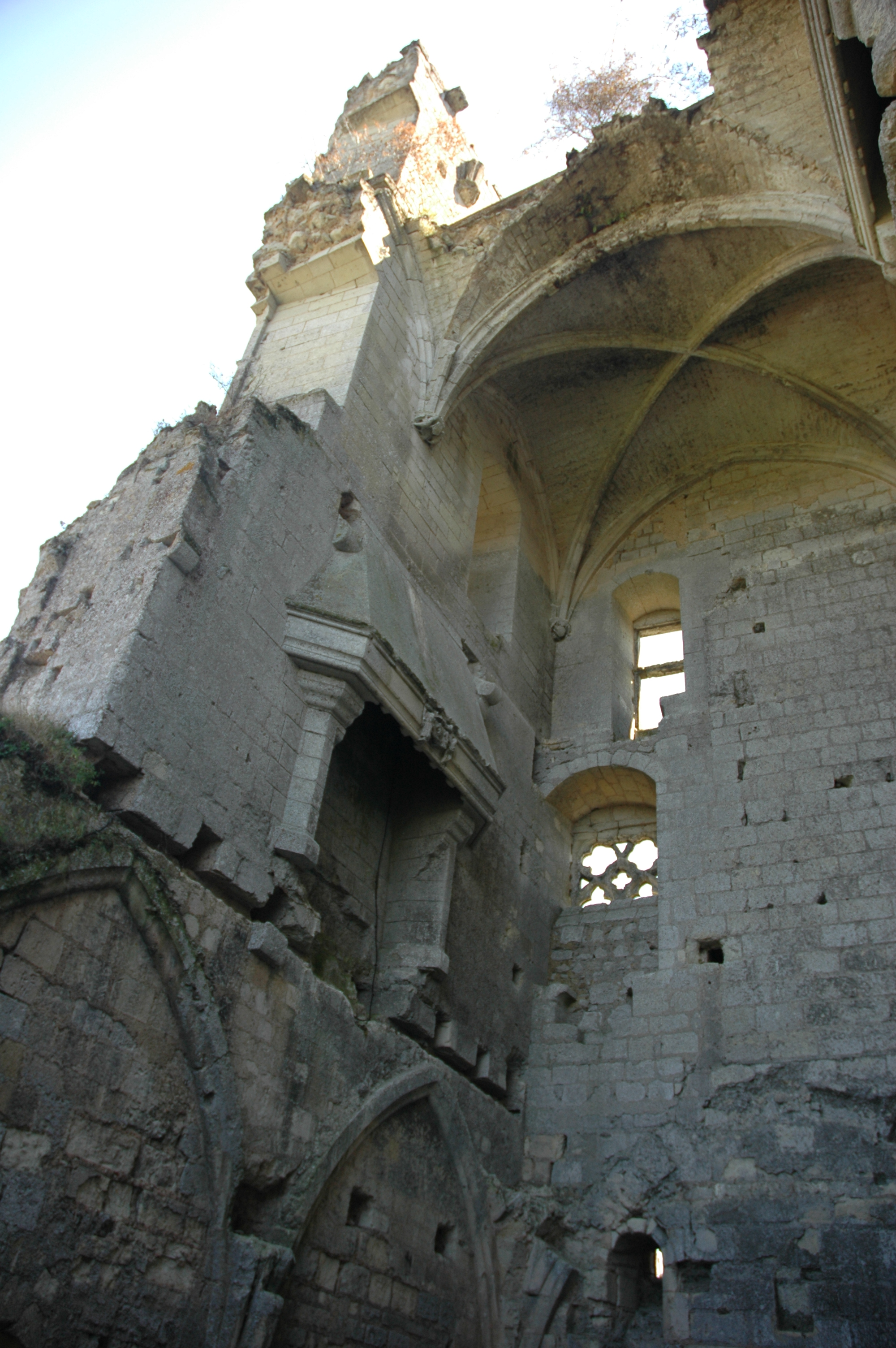 France Loir-et-Cher Lavardin Le château (intérieur du donjon) Photographie prise par GIRAUD Patrick